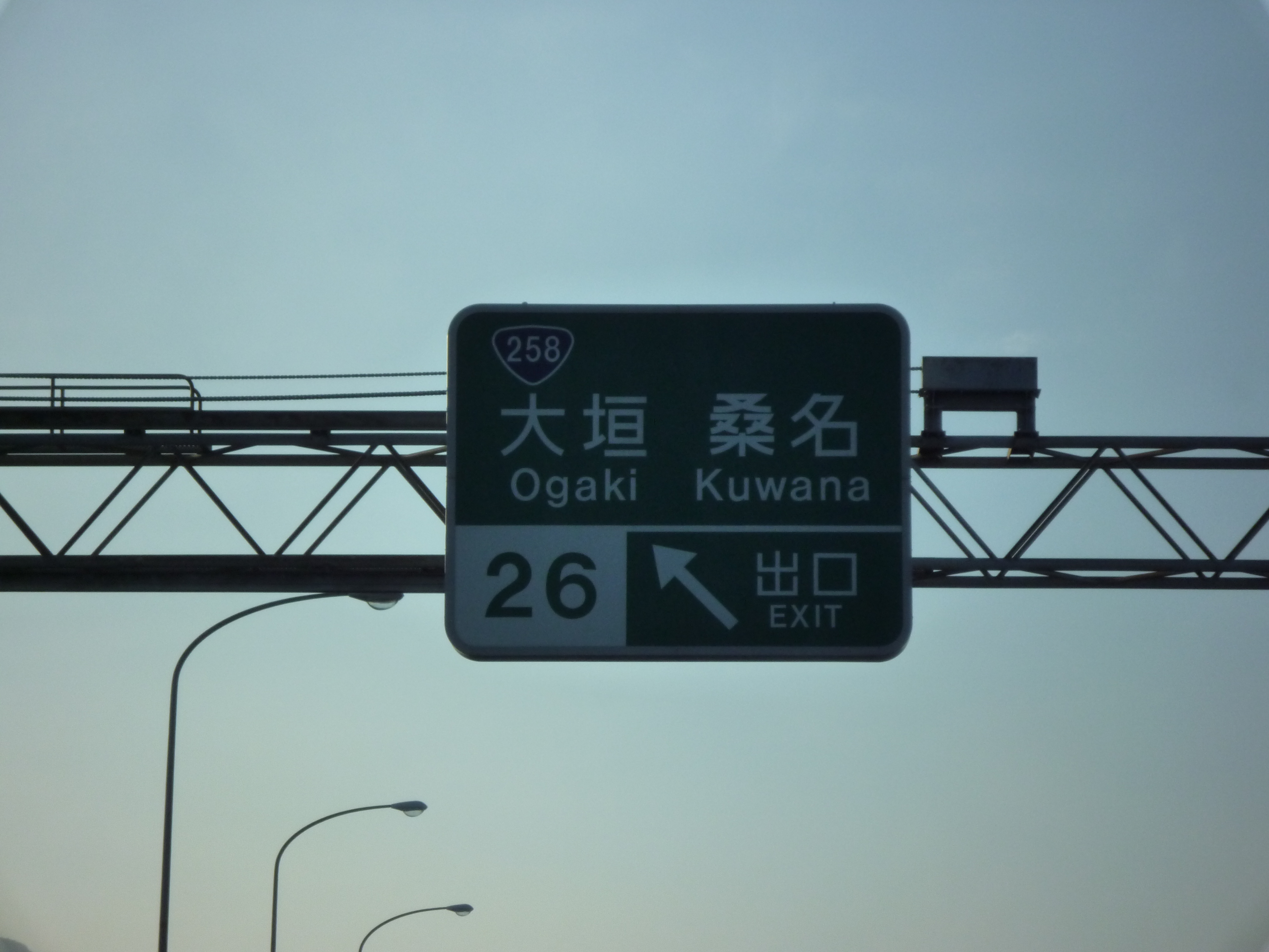 名神高速道路 大垣インターチェンジ 出口標識